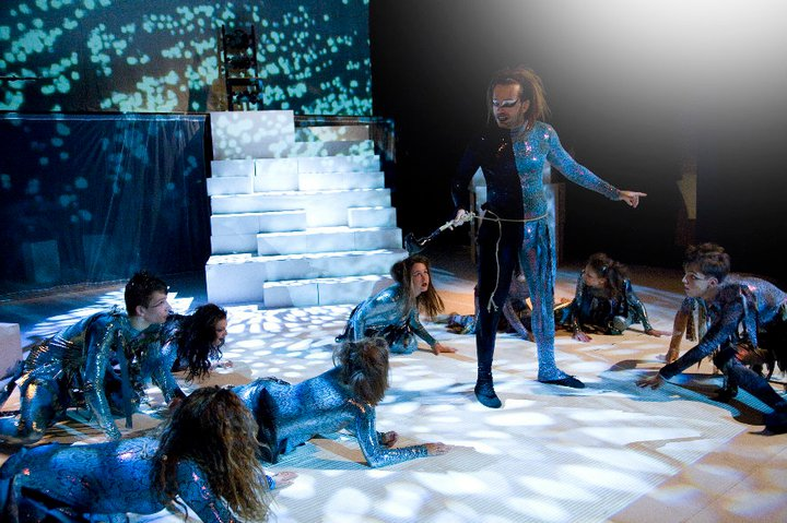 Snímek z inscenace "Sen svatojánské noci" Williama Shakespeara v režii Jana Kačera. Na snímku Petr Mikeska.